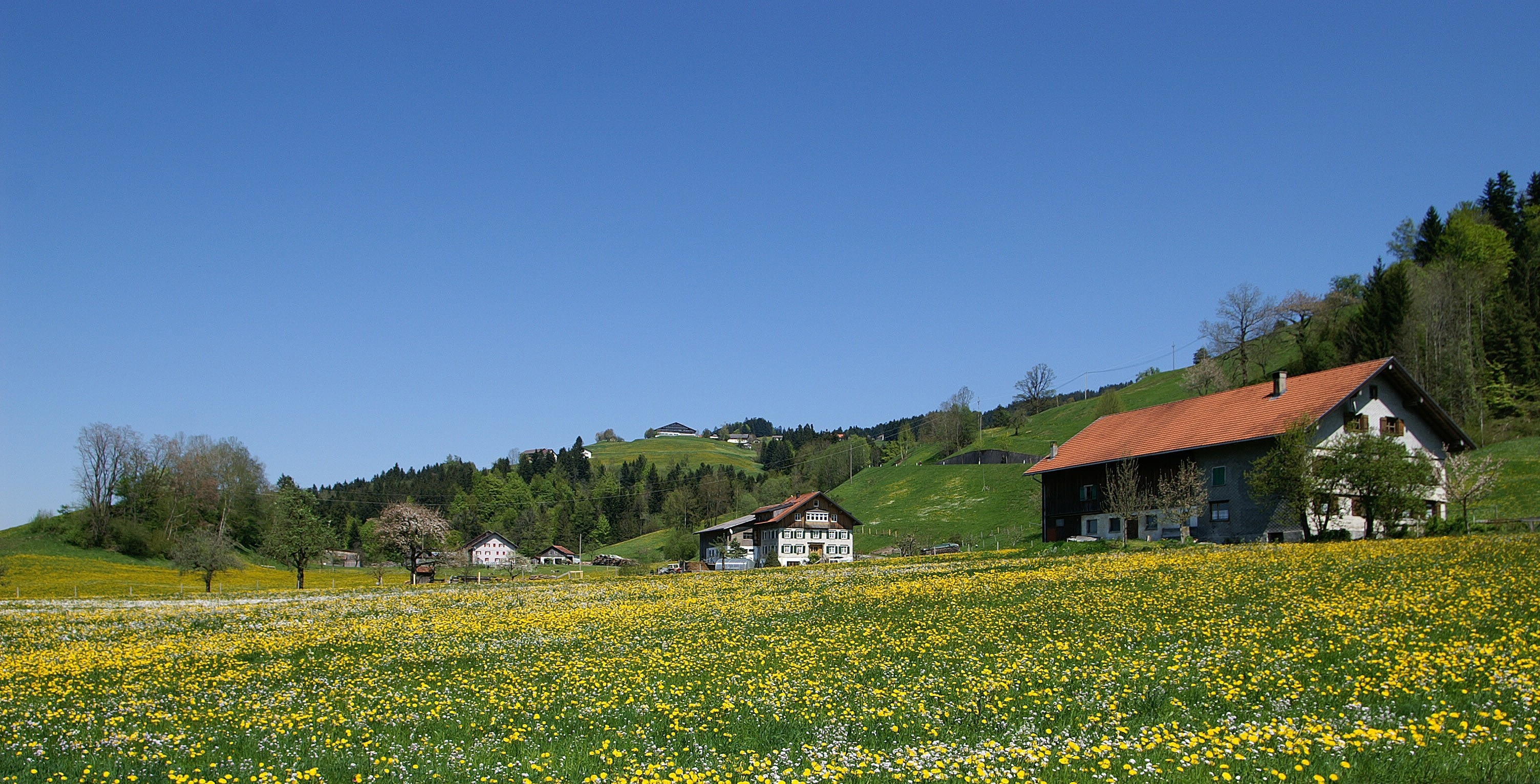 Blick von Eschau auf den Schönenbühl von Sulzberg, Vorarlberg.